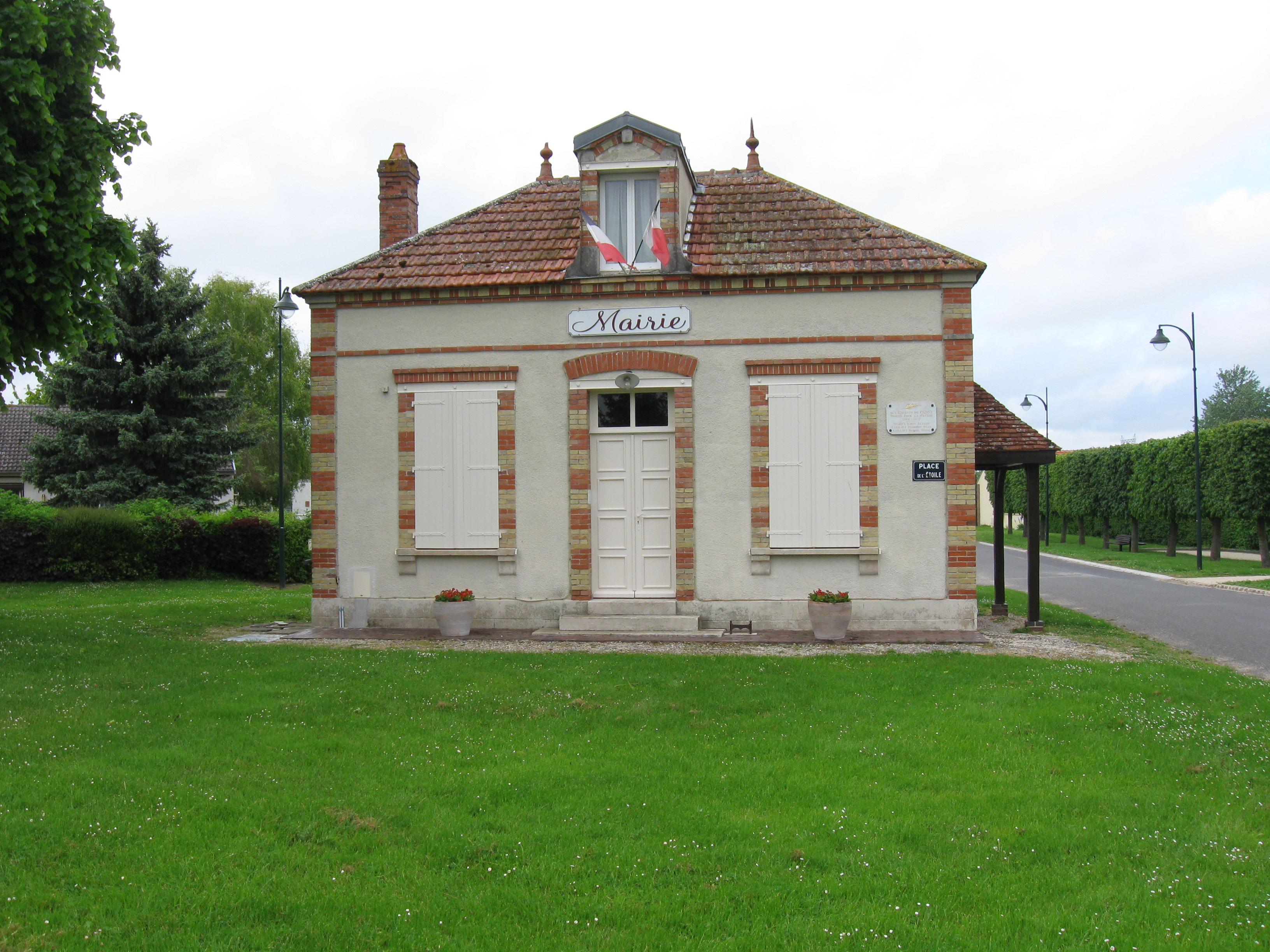 Mairie de Passy-sur-Seine. (Seine-et-Marne, région Île-de-France).